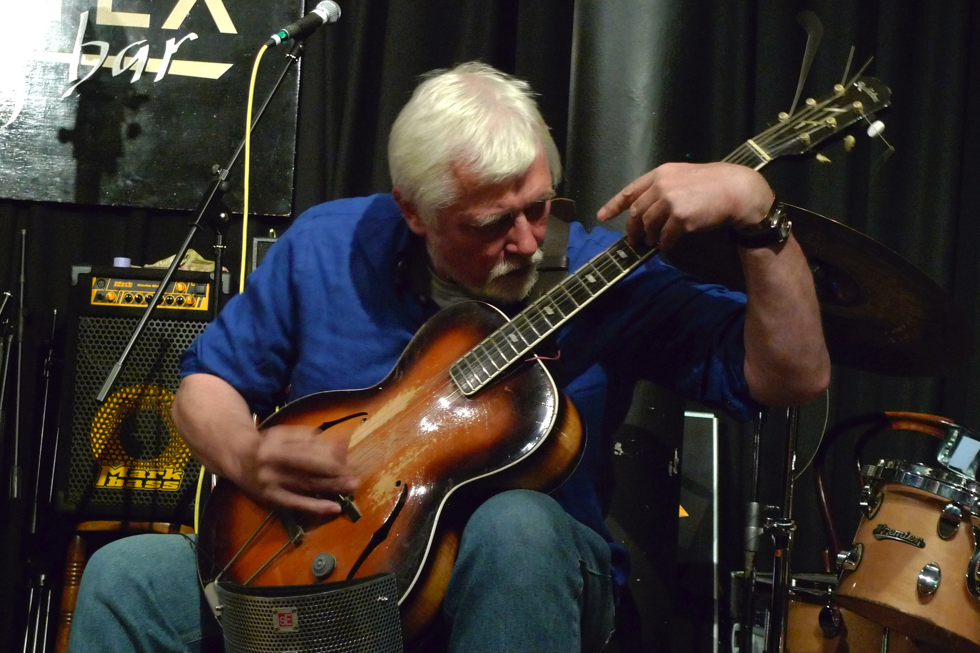 Vortex, London - 15/16/17 August 2010. Chris Burn - Trumpet John Butcher - Soprano and Tenor Saxophones Tania Chen - Piano Lol Coxhill - Soprano Saxophone Aleks Kolkowski - Stroh Violin, Saw. Dominic Lash - Bass John Russell - Guitar Akio Suzuki - Sound Art Sabu Toyozumi - Drums Alex Ward - Clarinet Ute Wassermann - Voice